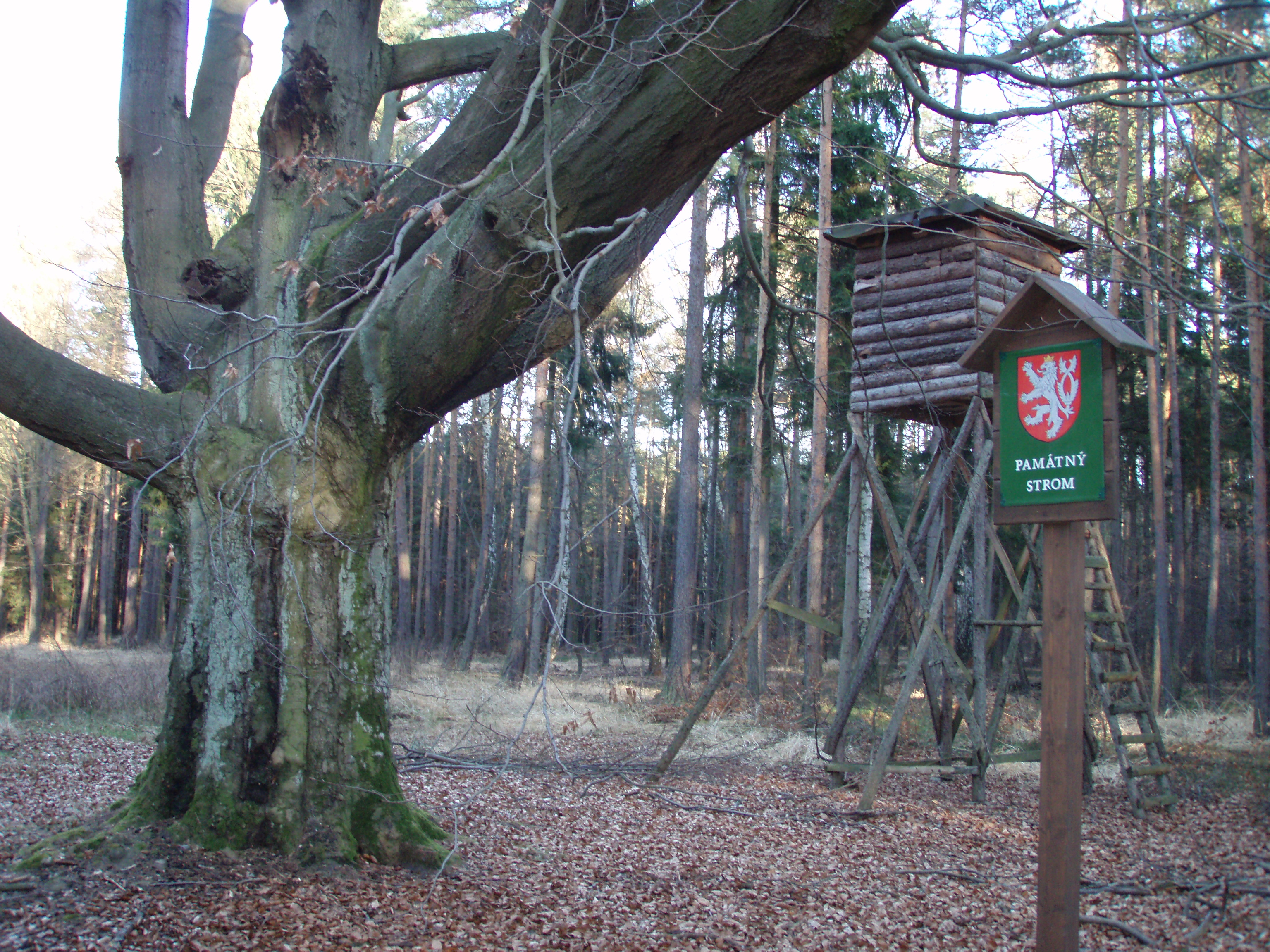 Buk v Budlíně z jihozápadu.